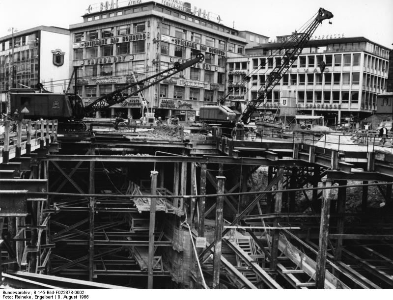 Frankfurt/Main, 1966 U-Bahn-Bau